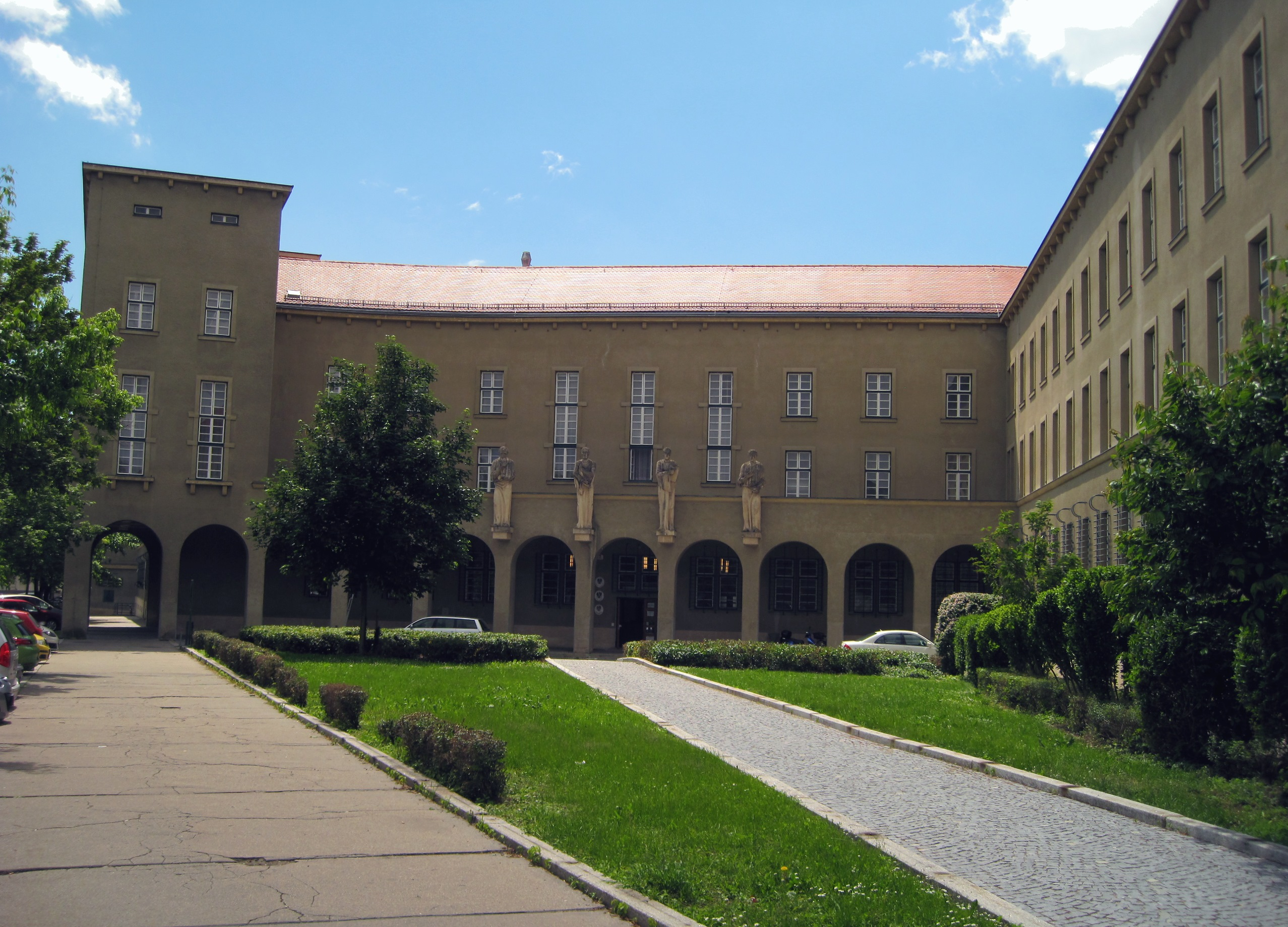 Landesgericht, Bezirksgericht und Staatsanwaltschaft in Krems an der Donau.